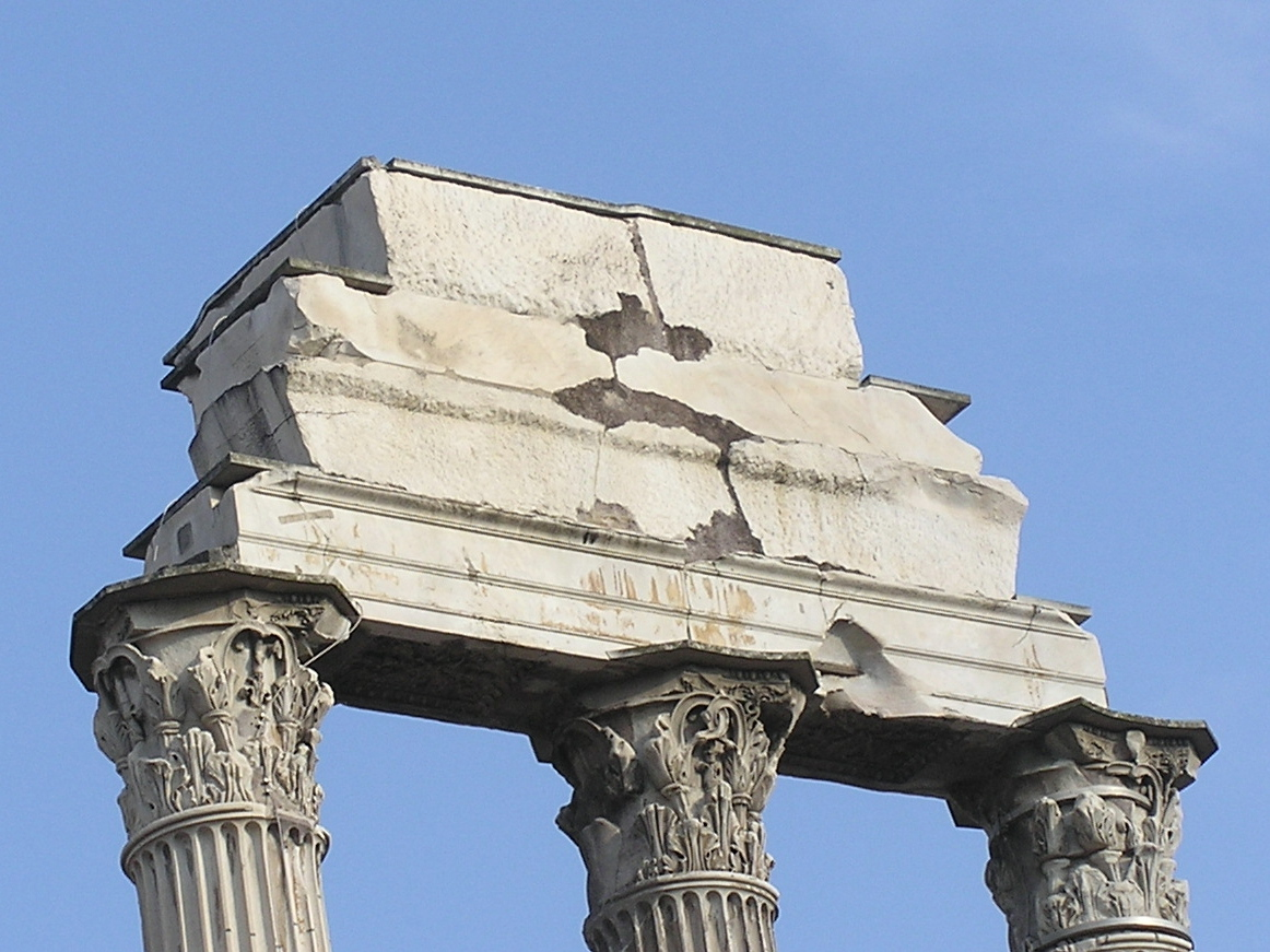 Tempio dei Càstori o Dioscuri, Roma: Trabeazione [retro]